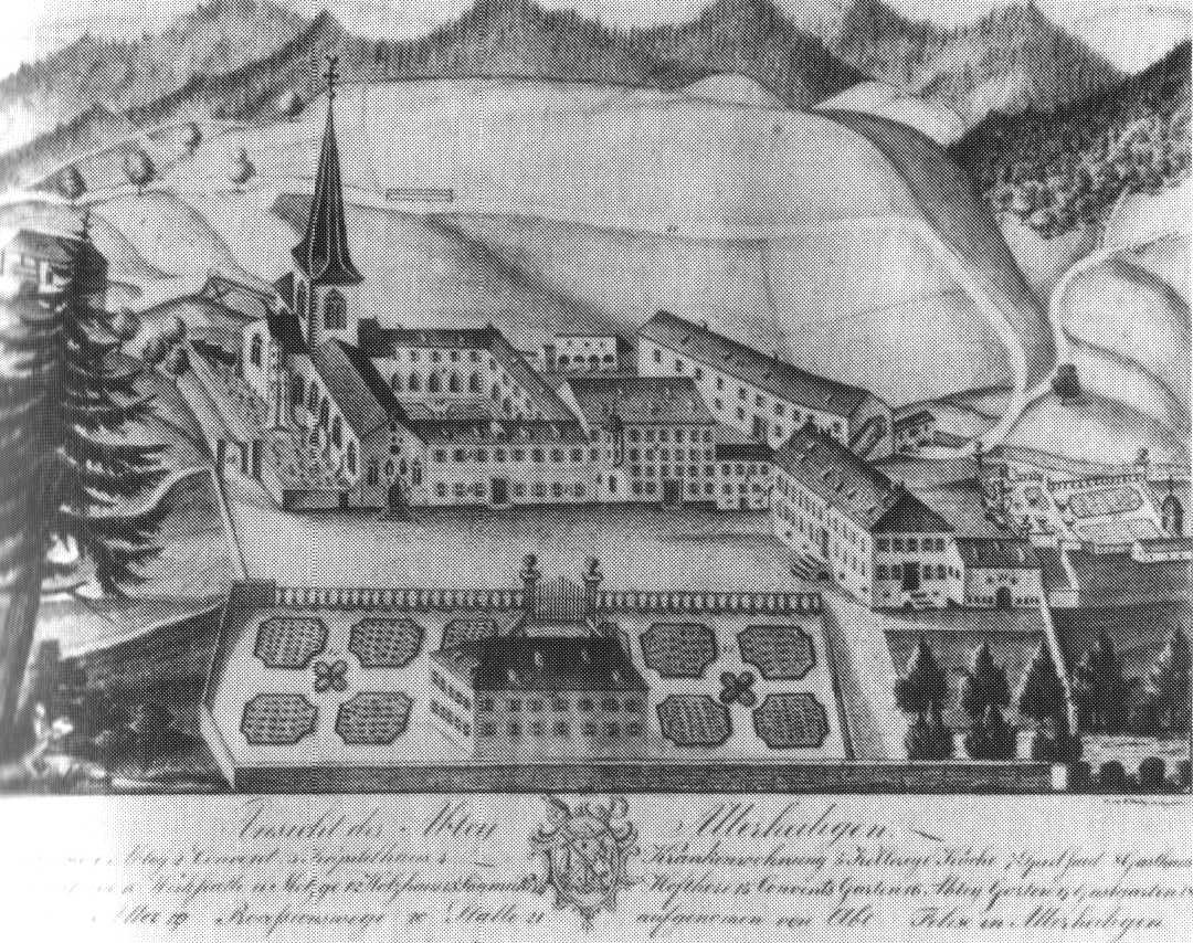 All Saints' Abbey (Baden-Württemberg). Kloster Allerheiligen Zeichnung von B. Walter nach einer Darstellung von Felix Kemmerle. Original im Heimatmuseum Oppenau.